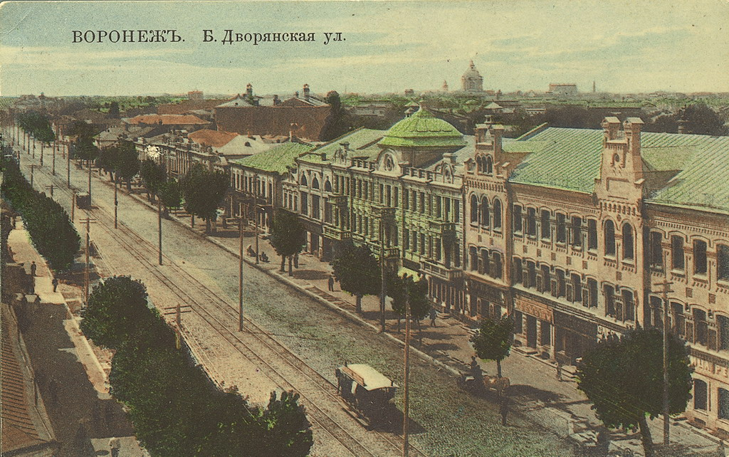 Конка в Воронеже на проспекте Революции около 1900 года